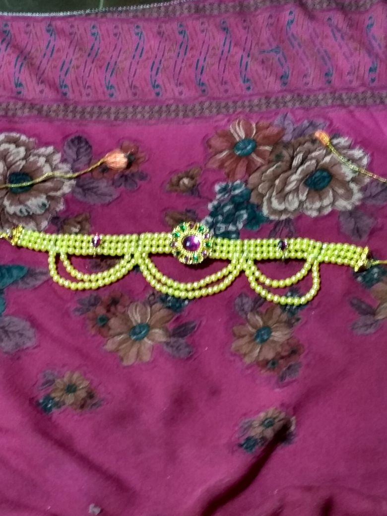 कमरपट्टा मोत्यांचा